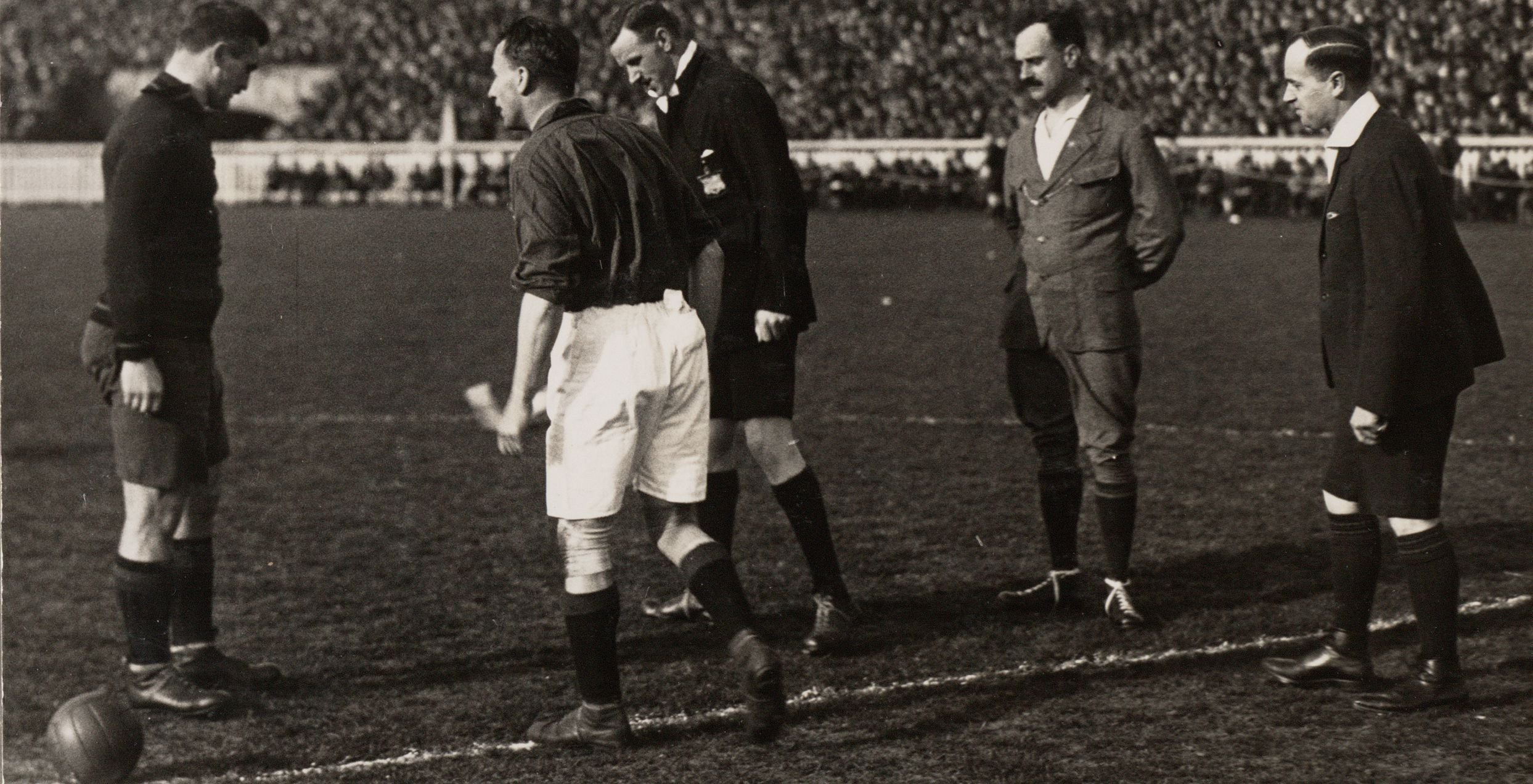 De Belgische aanvoerder Armand Swartenbroeks, Harry Dénis, de Engelse scheidsrechter Rous, de Belgische grensrechter Berwouts en de Nederlandse grensrechter Versteegh Meulemans voor aanvang van de wedstrijd. België - Nederland (2-0), gespeeld op 13 maart 1927 in het stadion van Antwerp FC (De Bosuil) te Antwerpen.